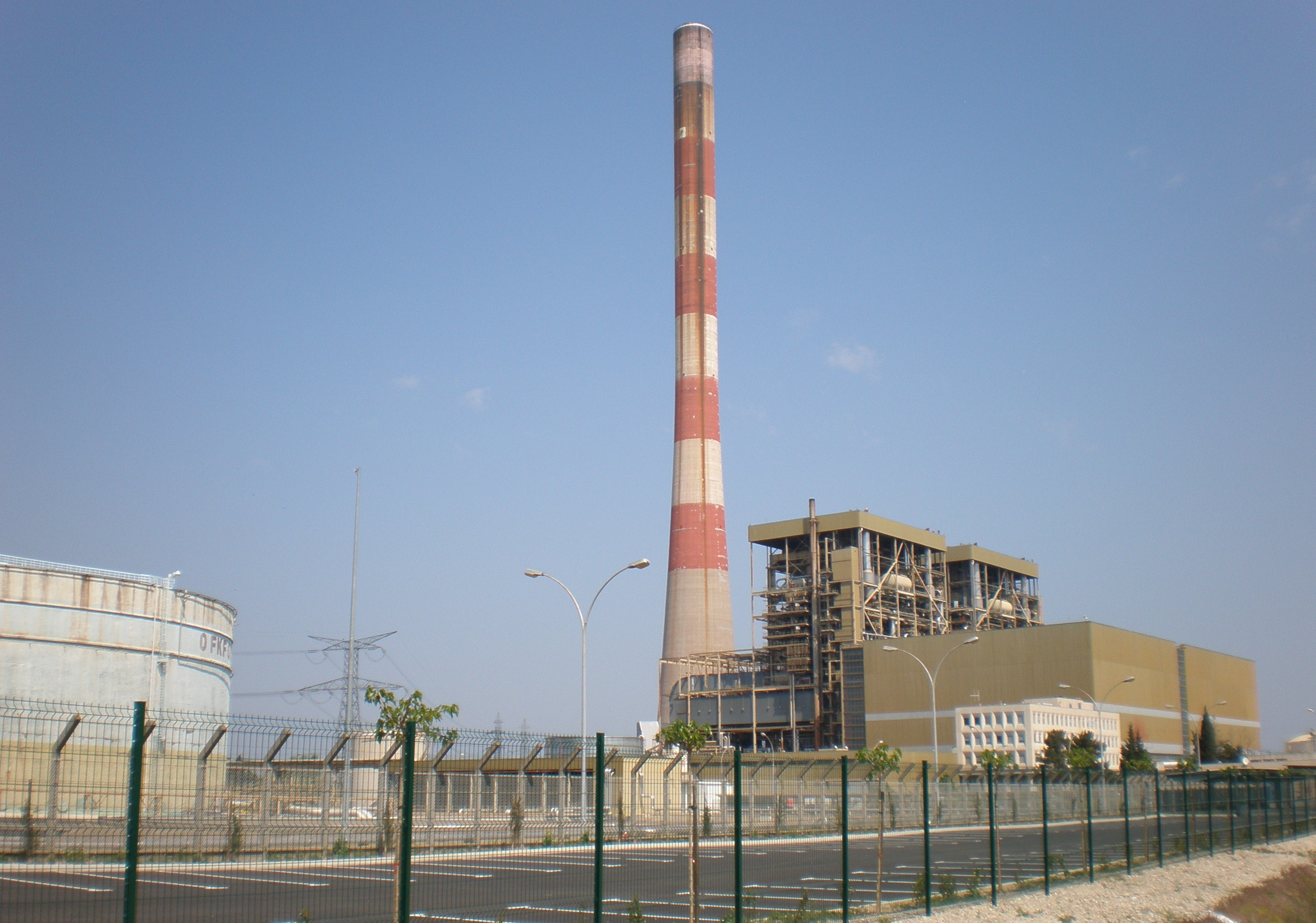 La centrale thermique EDF d'Aramon (Gard, France)